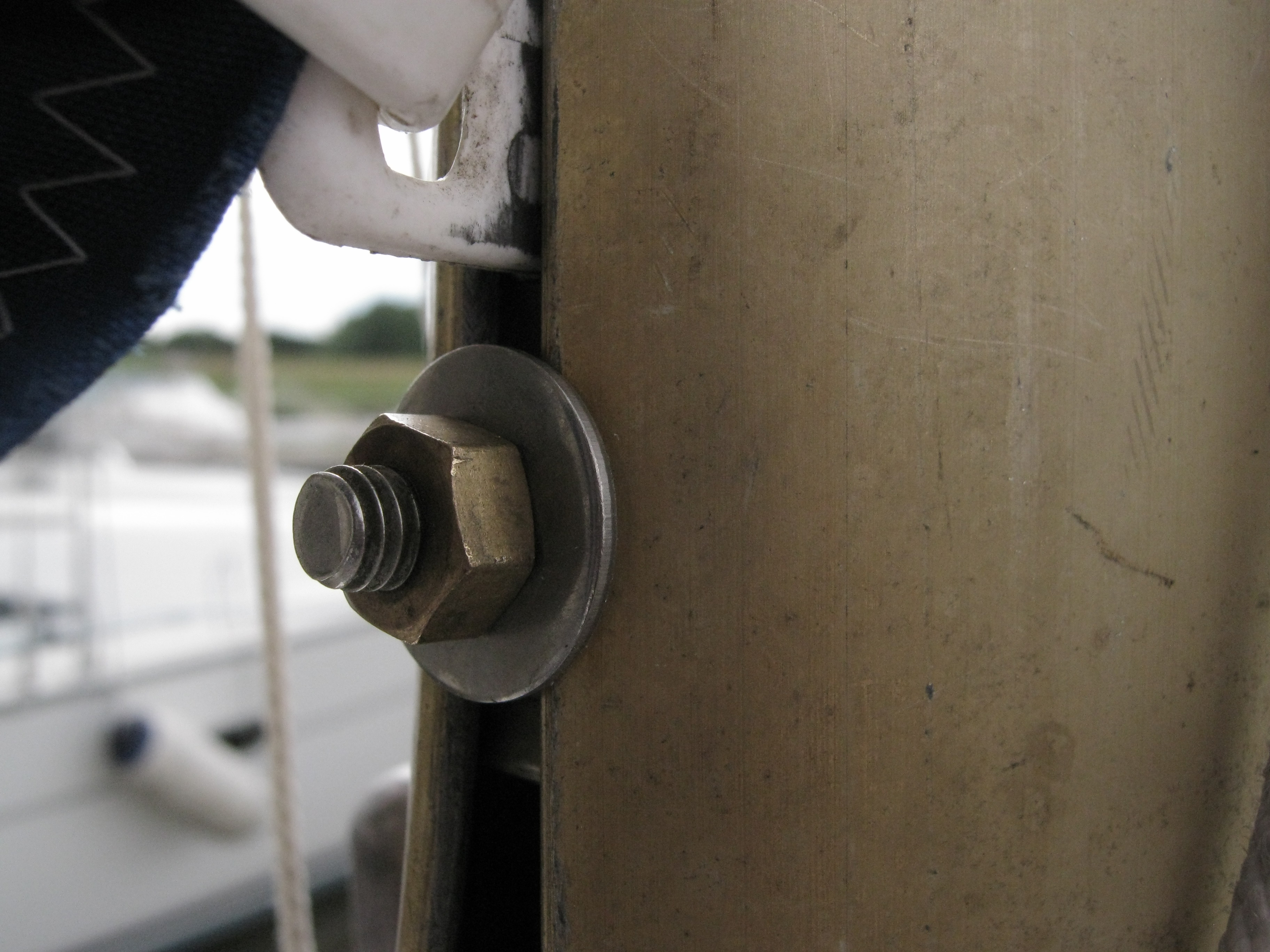 Mastrutscherstopper